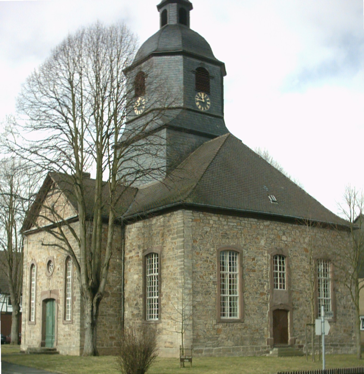 ev. Kirche in Veckerhagen (erbaut 1778) Fotograf: presse03, selbst fotografiert, 13.03.2005 Lizenz: GNU-FDL Kategorie:Bild:Kirche